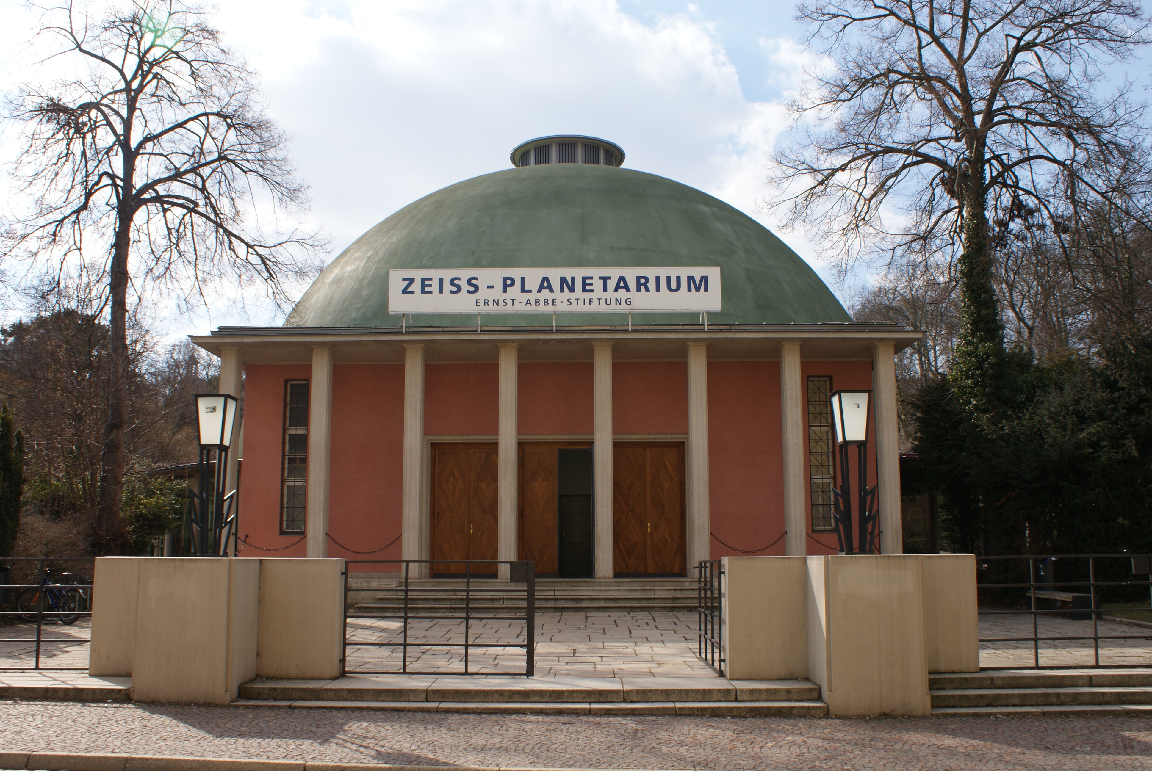 Bild vom 7. April 2013, Das Planetarium Jena nach der Renovierung im Herbst 2012.